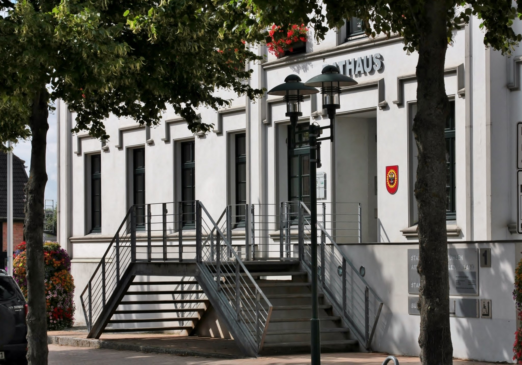 Das ist das Rathaus von Grevesmühlen